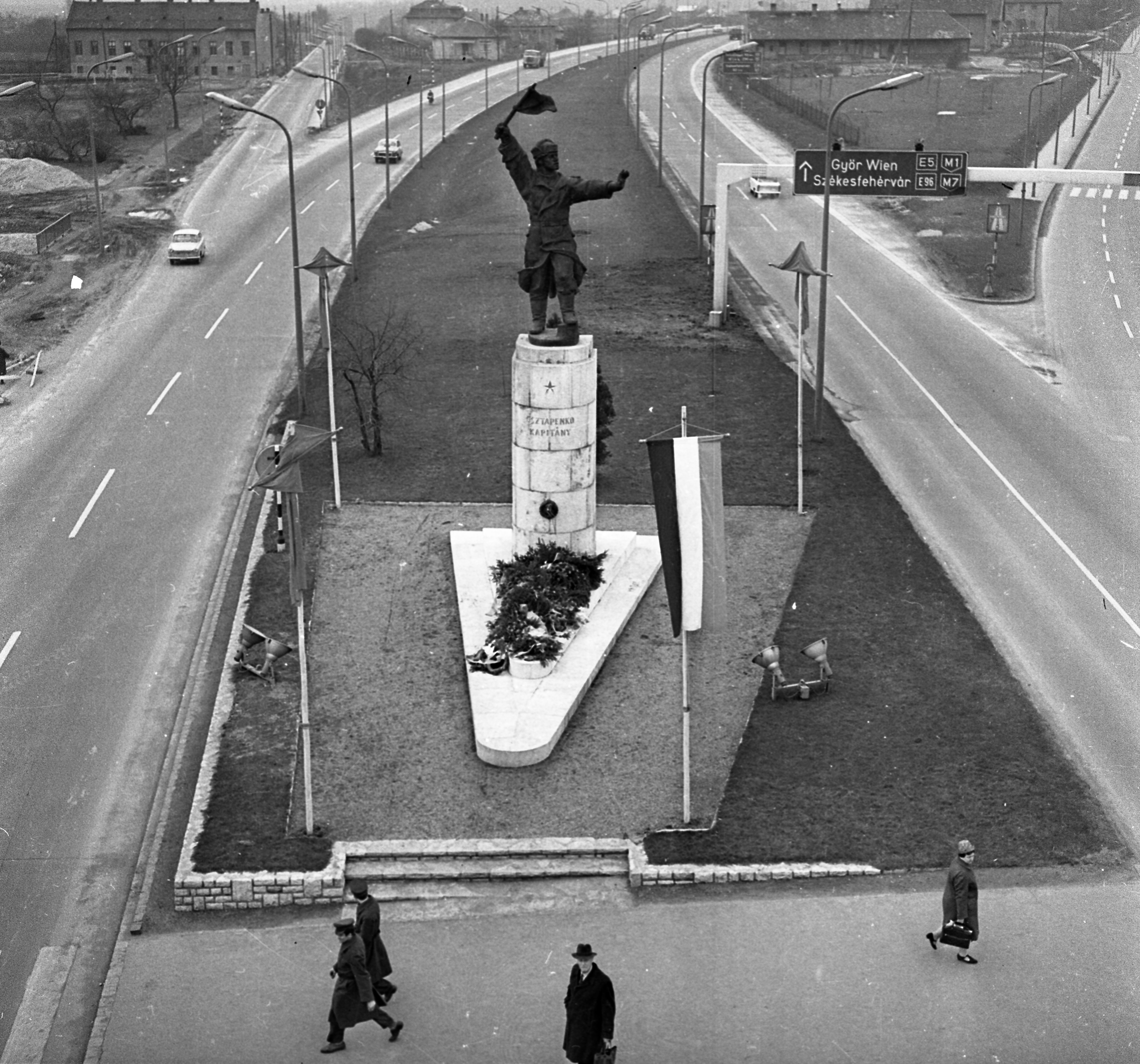 Az Osztyapenkó szobor a Balatoni út és az M1-M7 közös szakaszánál a Budaörsi út irányából nézve.